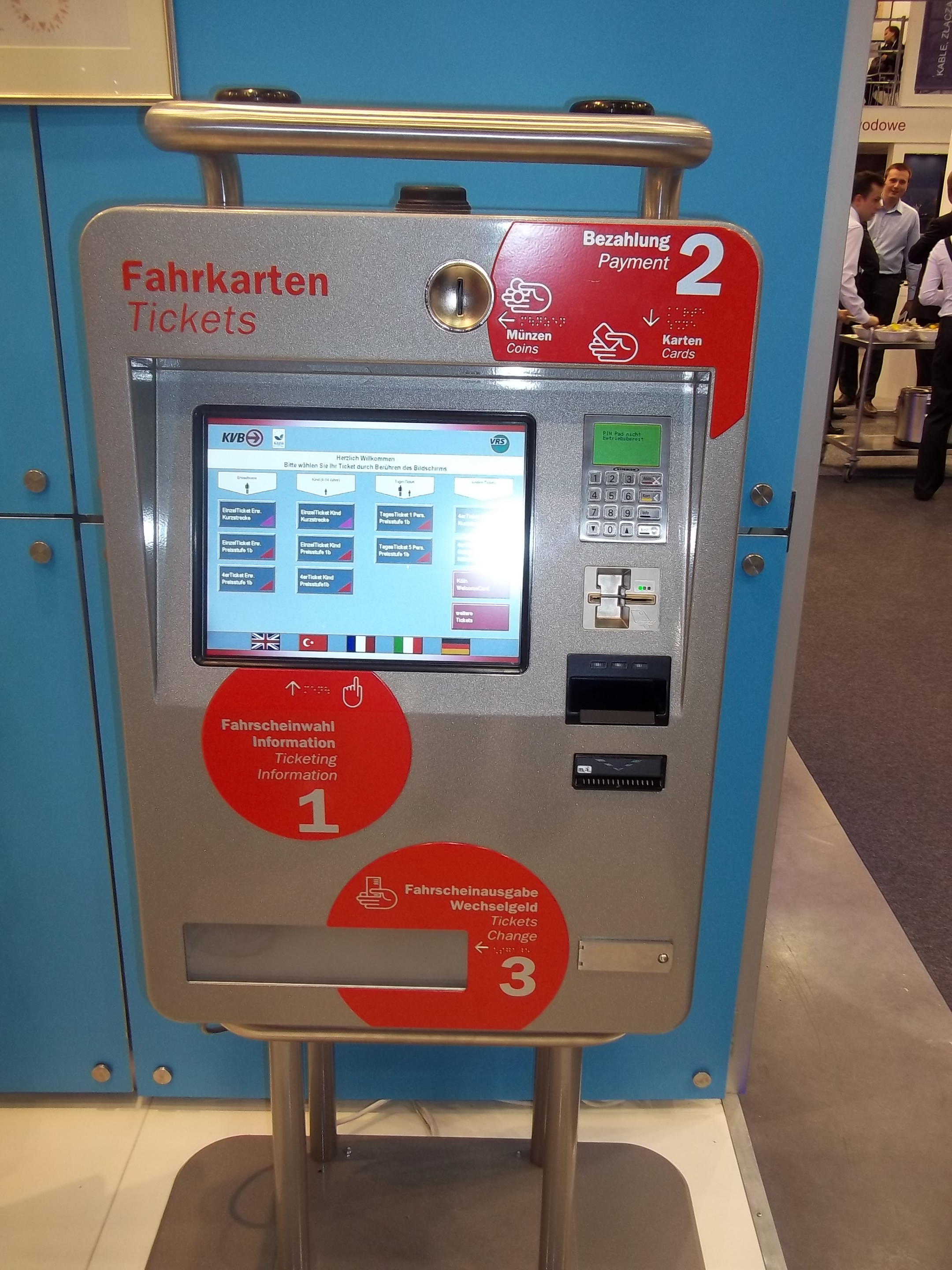 KVB VRS biletomat zaprezentowany przez firmę Avista na TRAKO 2013 w Gdańsku.